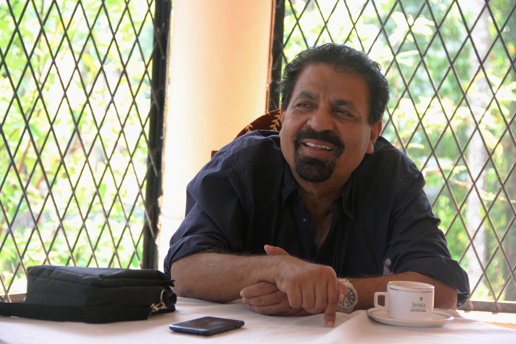 പി.ടി. കുഞ്ഞുമുഹമ്മദ്